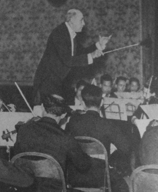 1937年の訪日時のフェリックス・ワインガルトナー